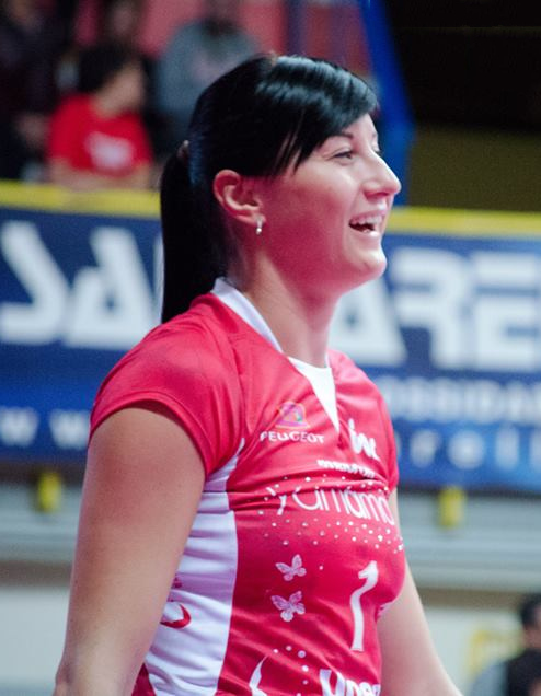 Pallavolista russa, gioca nel ruolo di centrale